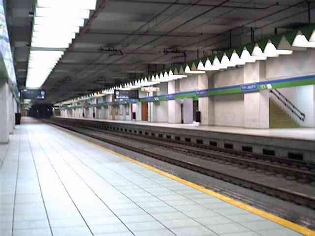 Interno della stazione sotterranea di Milano Lancetti del passante ferroviario di Milano.